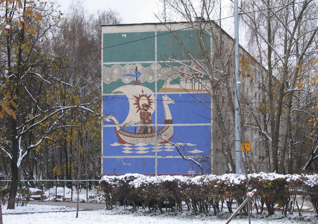 Ангарская улица до реконструкции.